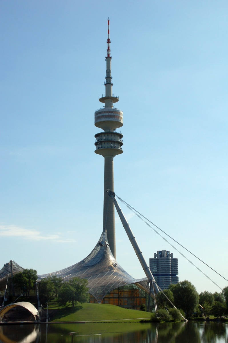 Olympiapark, München, Bayern, Deutschland